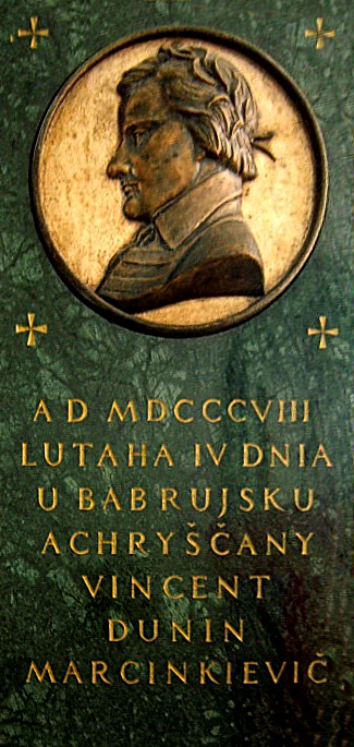 Бабруйск. Інтэр'ер касцёла. Дунін-Марцінкевіч